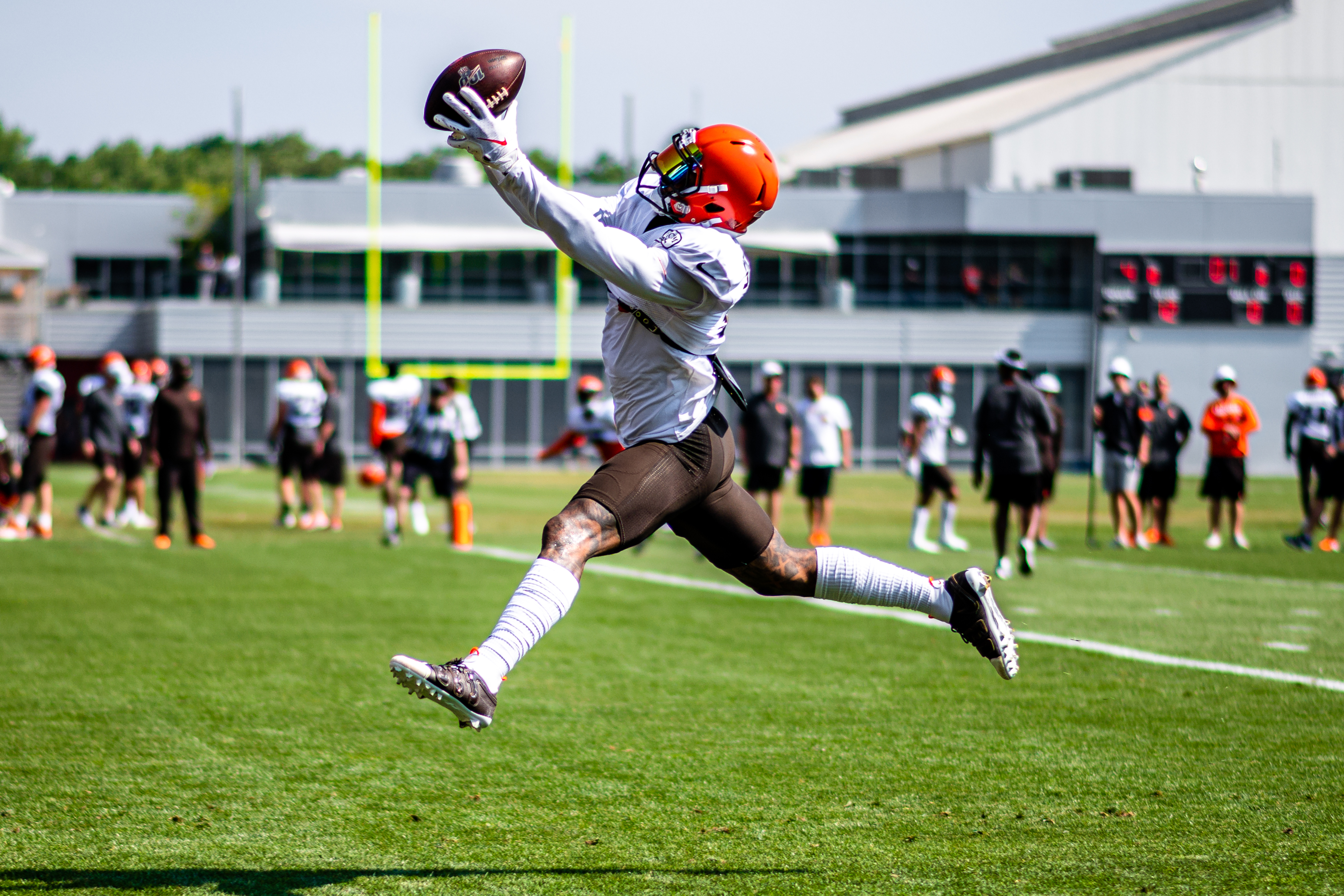 Odell Beckham Jr.